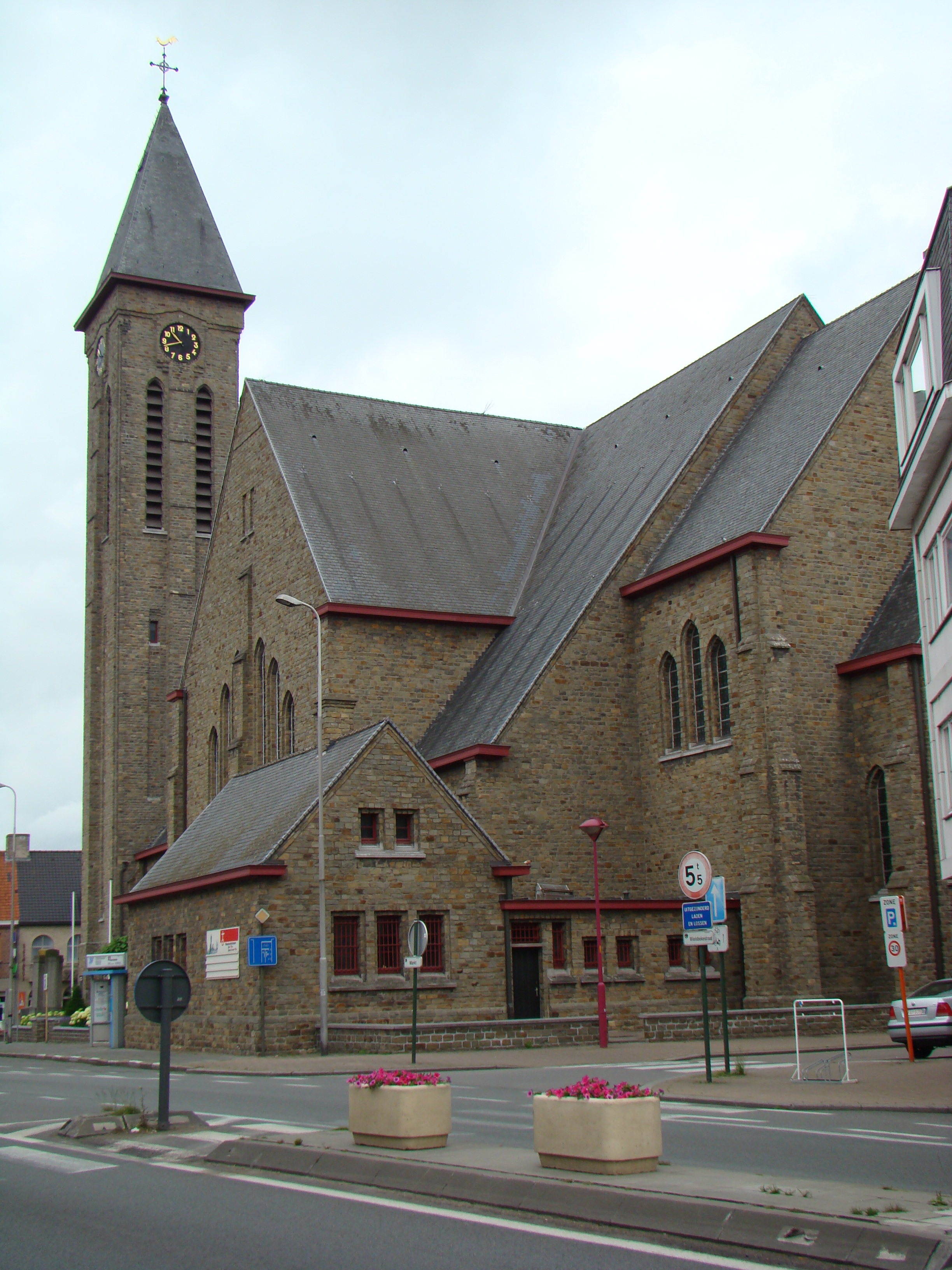 Oostrozebeke St-Amanduskerk Oostrozebeke St-Amandus church, West Flanders, Belgium Oostrozebeke église St-Amandus, Flandre Occidentale, Belgique